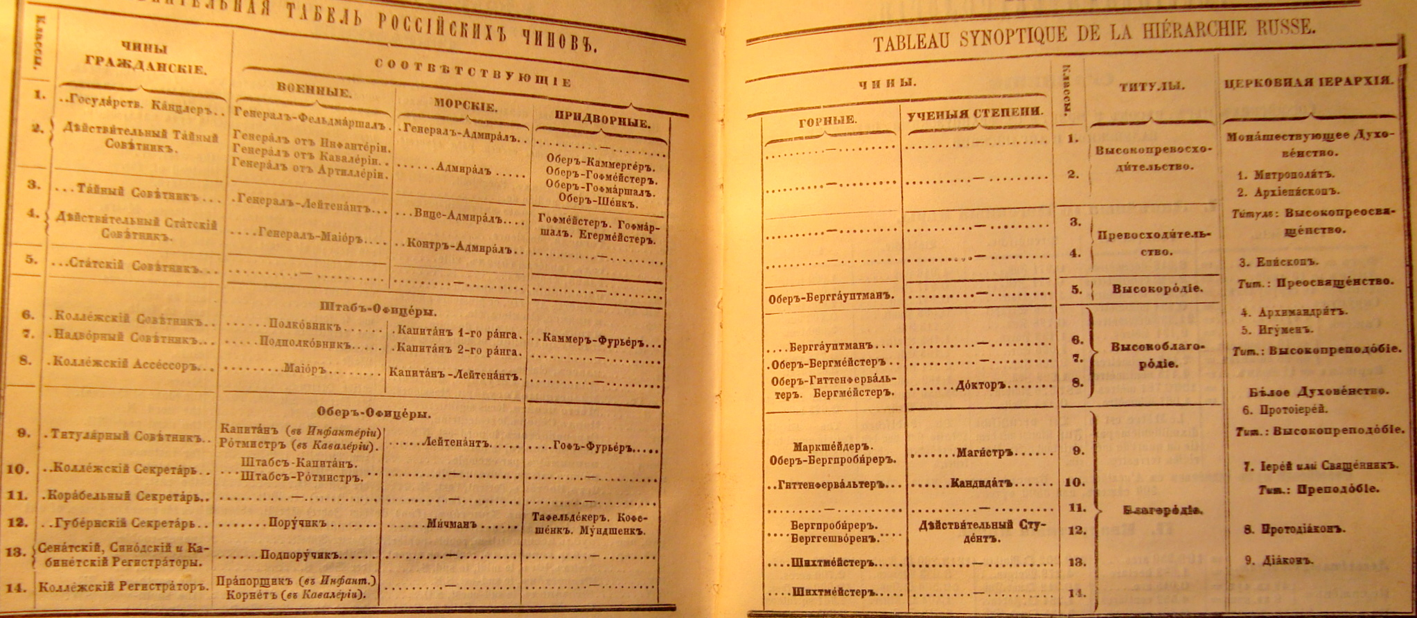 Фотография "Сравнительной табели российских чинов (Табели о рангах)" из издания Ф.Рейф Новые параллельные словари языков русского, французского, немецкого и английского в четырех частях (Часть первая - русский словарь) Карлсруэ. 1898 г. С.828-829.